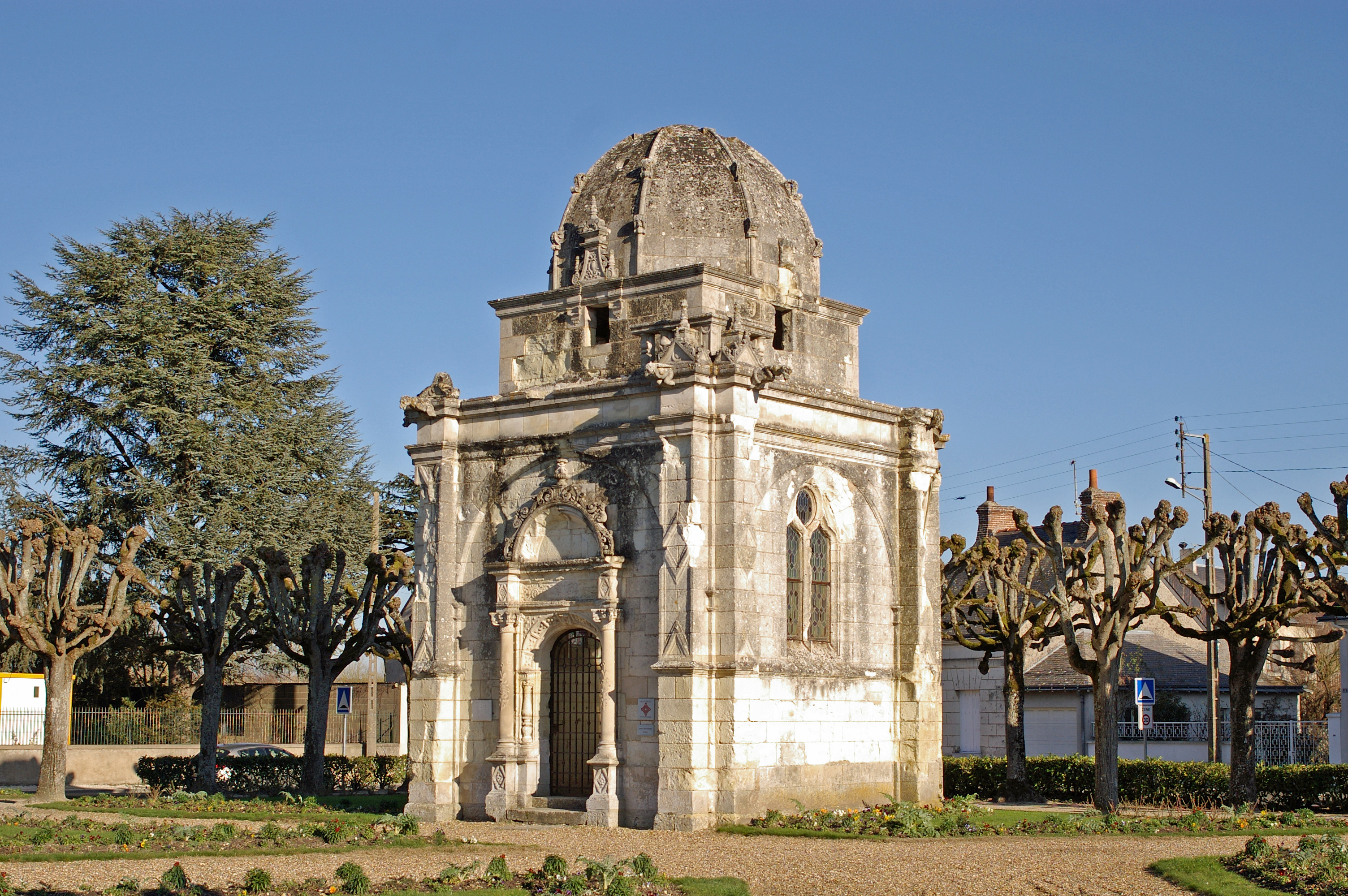 Bléré (Indre-et-Loire) Chapelle funèbre élevée par Jehan de Saignés, Seigneur de Bois Pataud, en 1526. A la mémoire de son pèreGuillaume Trésorier Payeur Général de l'Artillerie sous François Ier. Bléré (Indre-et-Loire) Funeral chapel erected by Jehan Saignés, Lord Pataud Wood in 1526. In memory of his père Guillaume Paymaster General of Artillery under King François Ier.